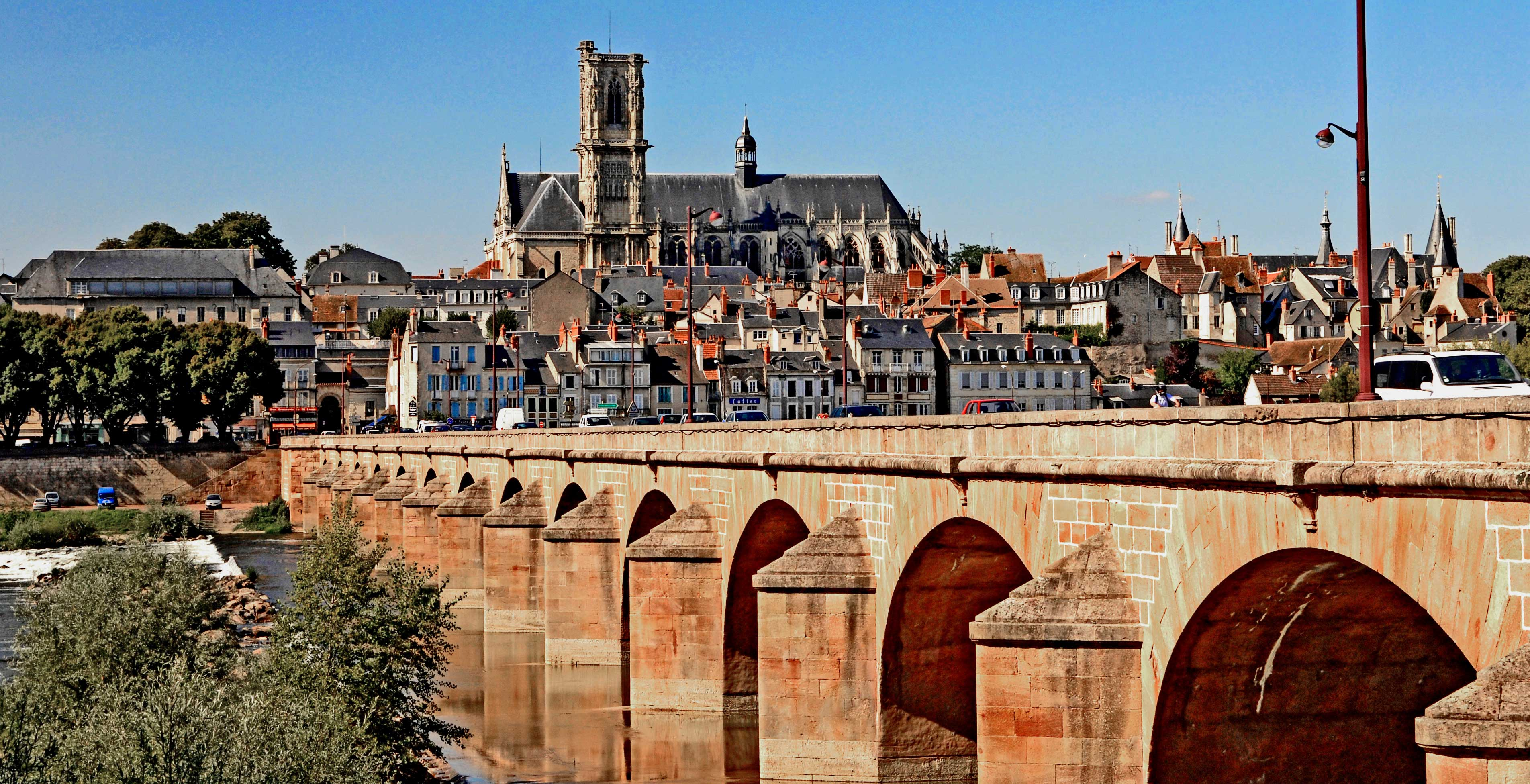 Nevers Loirebréck